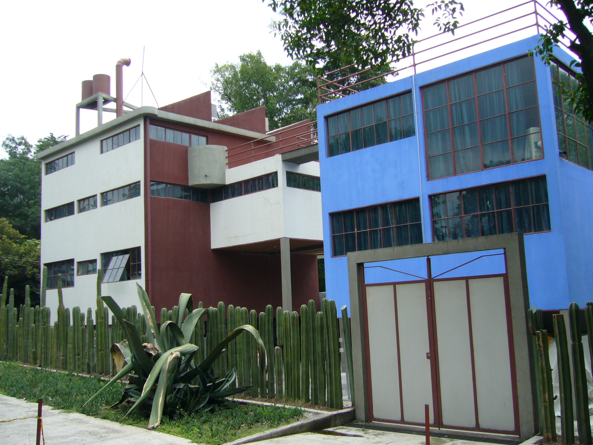 Casa Habitación Rivera y Kalho